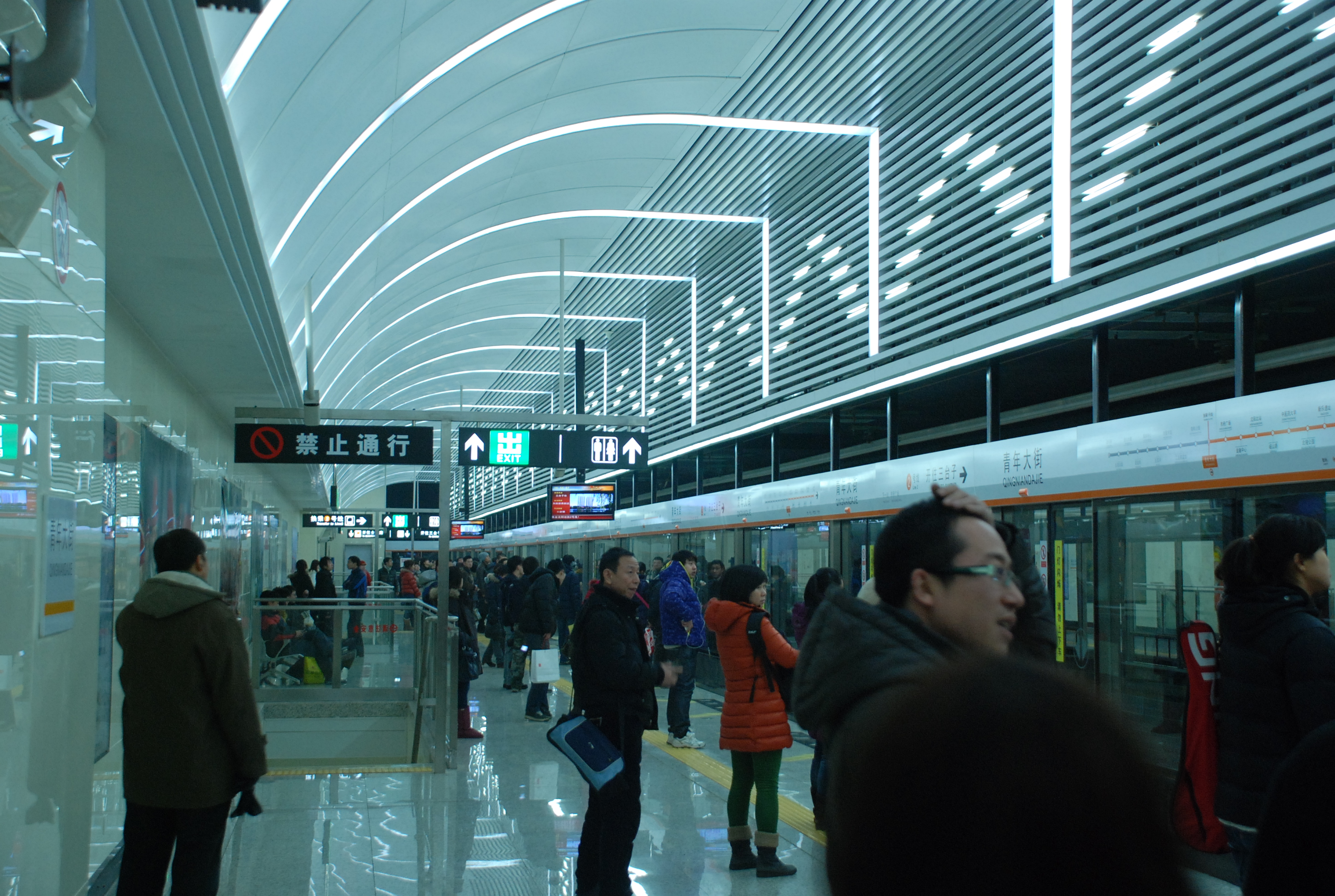 沈阳地铁青年大街换乘站二号线站台